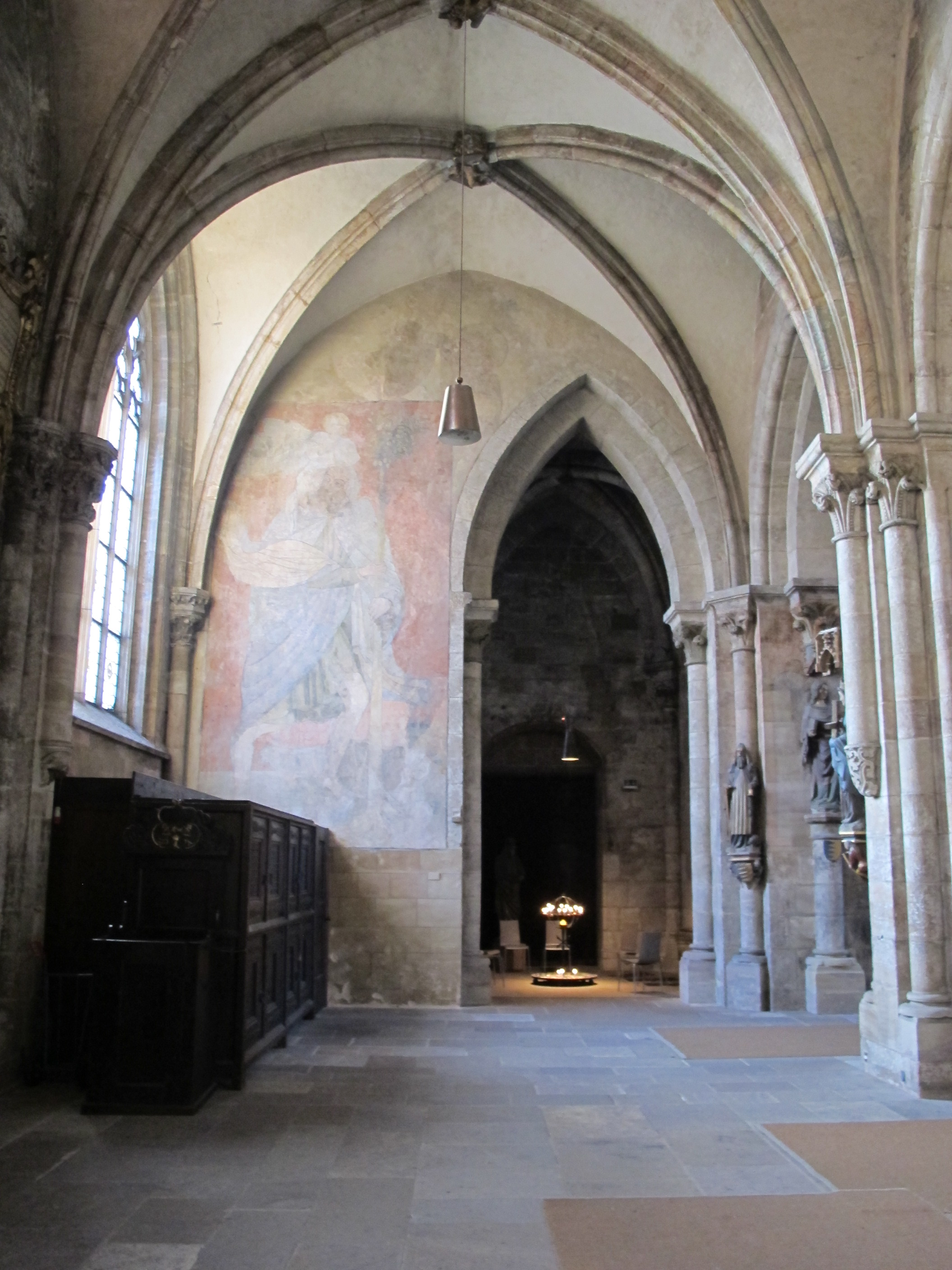 St. Sebald, Nuremberg, interrio